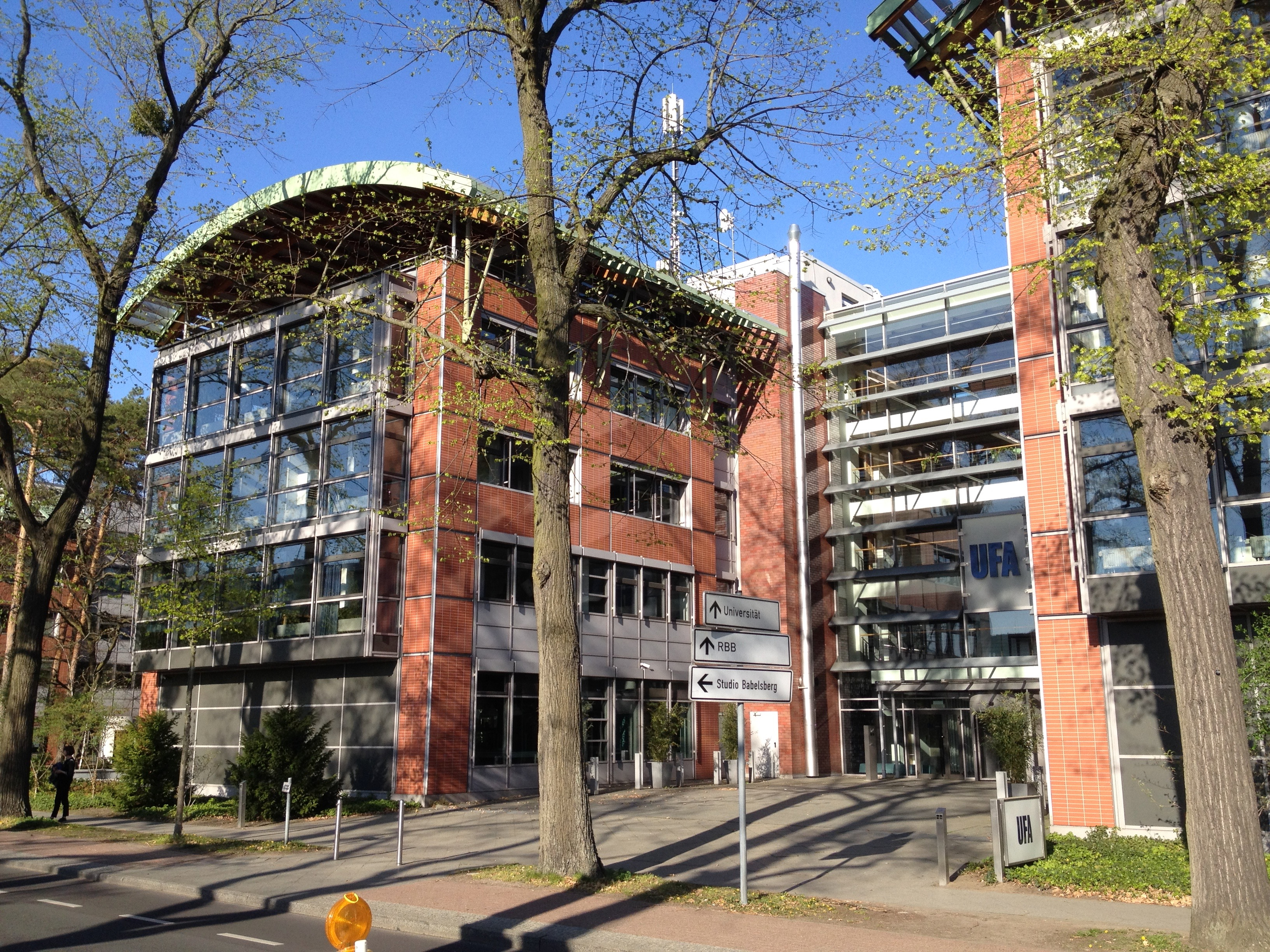 Sitz der Filmproduktionsfirma UFA GmbH